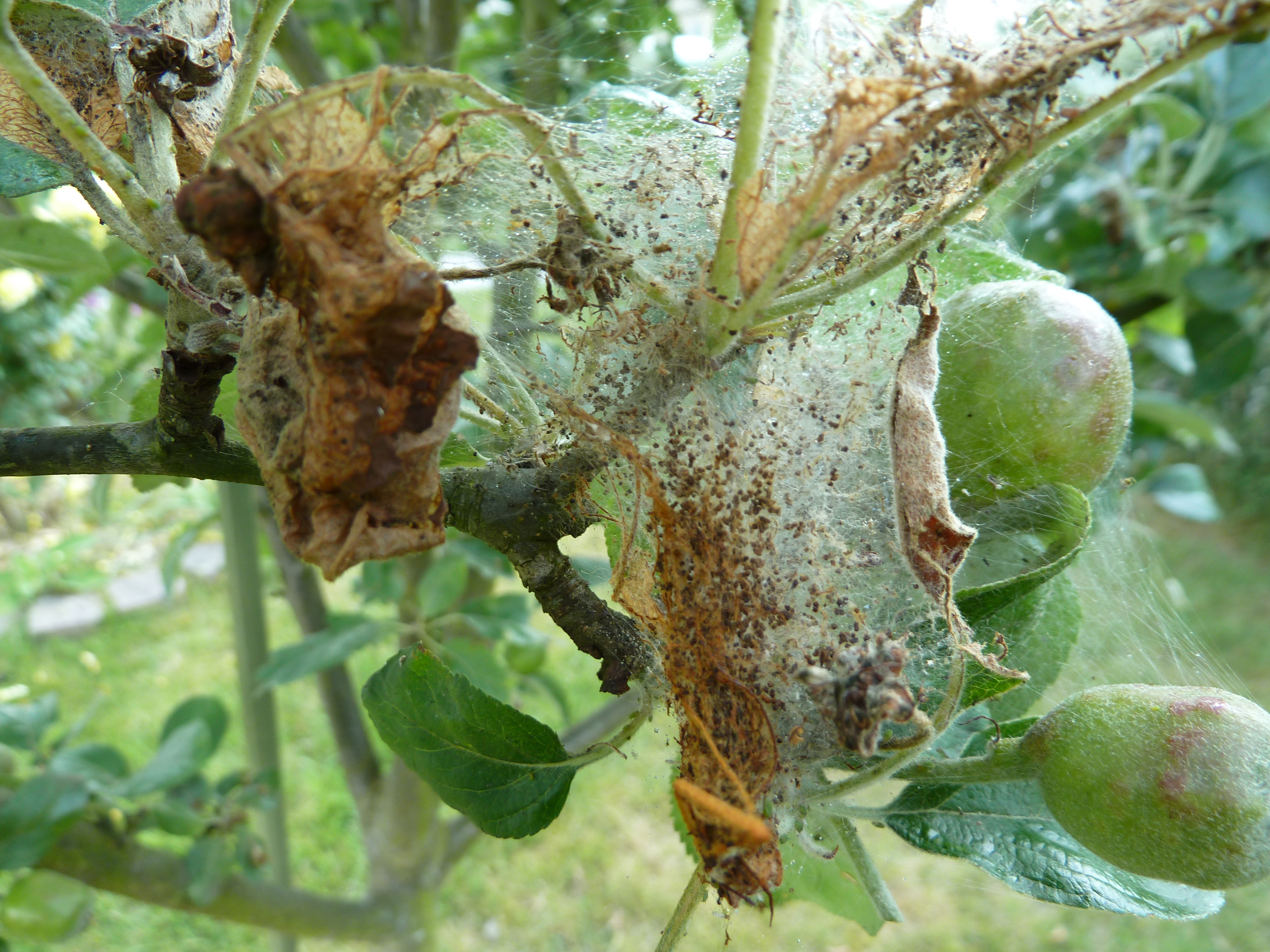 Gespinst der Apfel-Gespinstmotte (Yponomeuta malinellus)